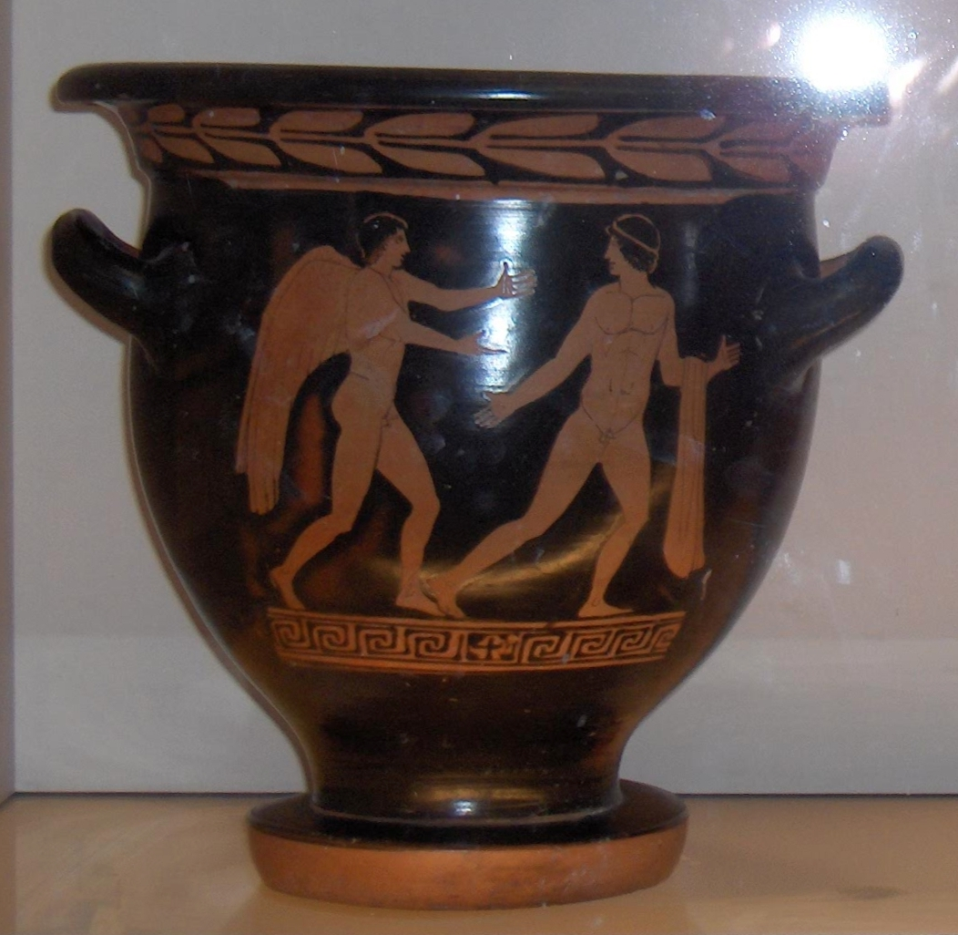 Immagine propria